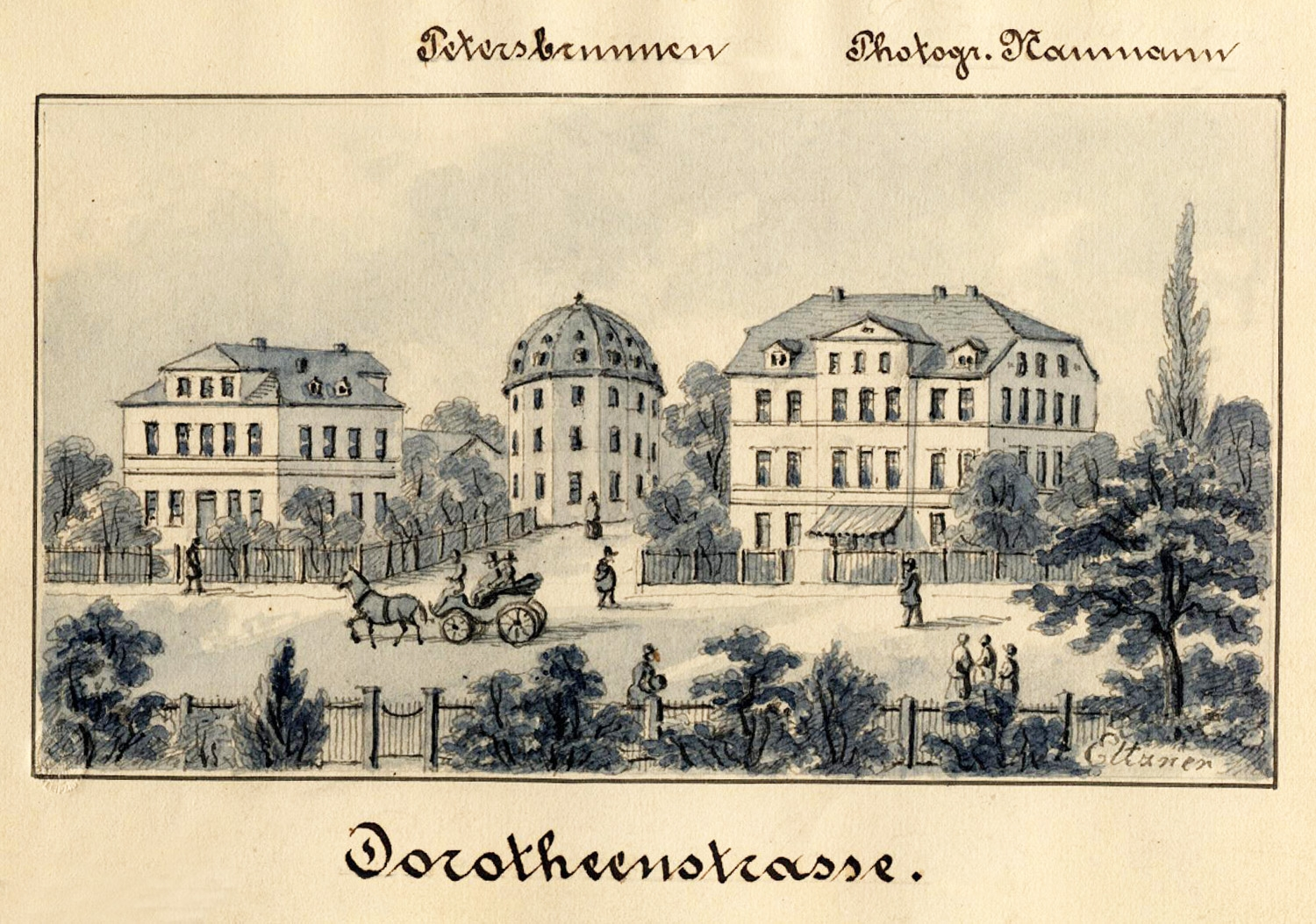 Das Badehaus Petersbrunnen in Reichels Garten nahe der Dorotheenstraße in Leipzig, um 1860